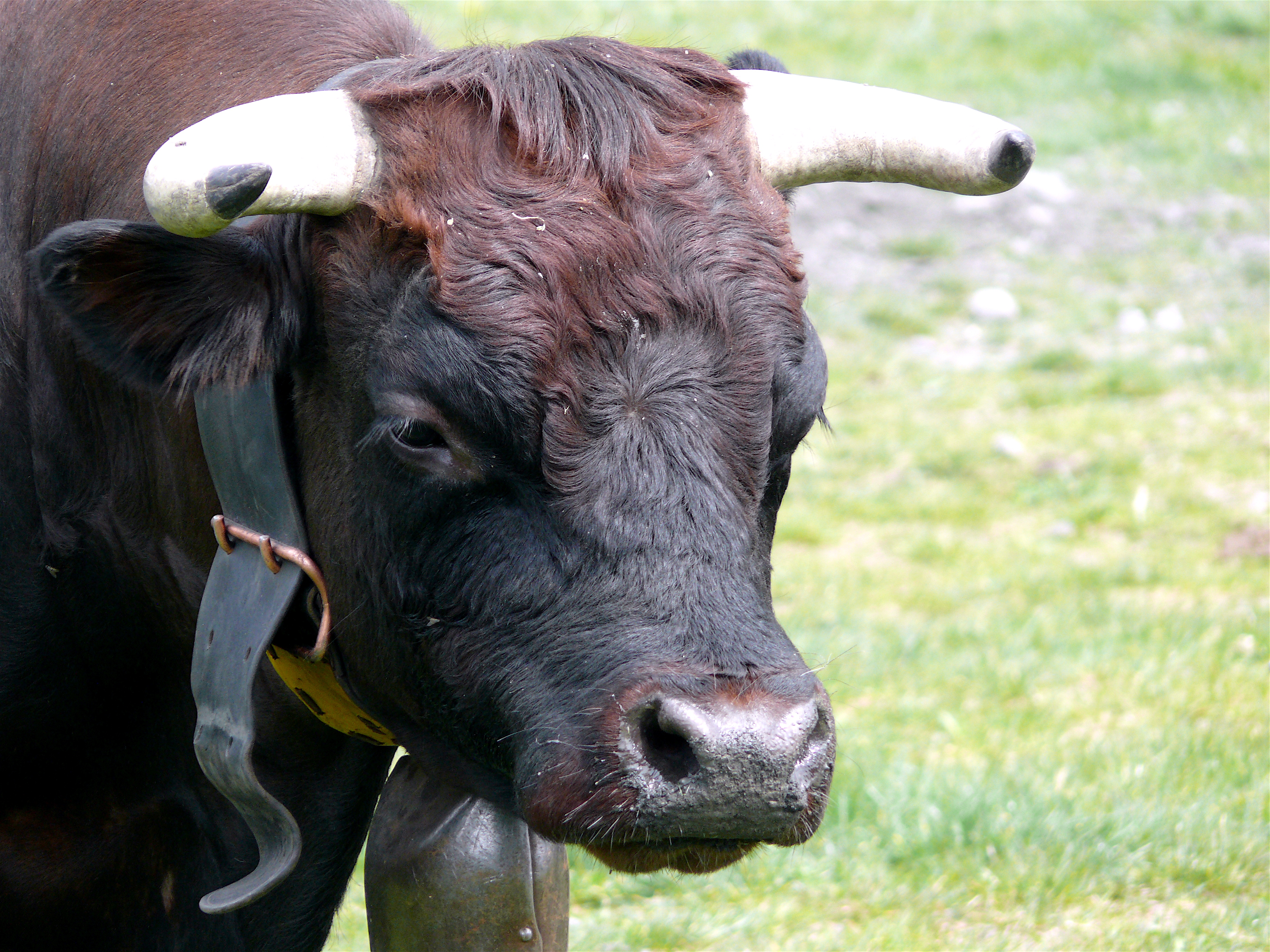 Un primo piano a una vacca di razza valdostana pezzata nera durante un combattimento della Bataille de reines ad Aosta, Valle d'Aosta, Italia. Foto con Panasonic DMC-FZ50.